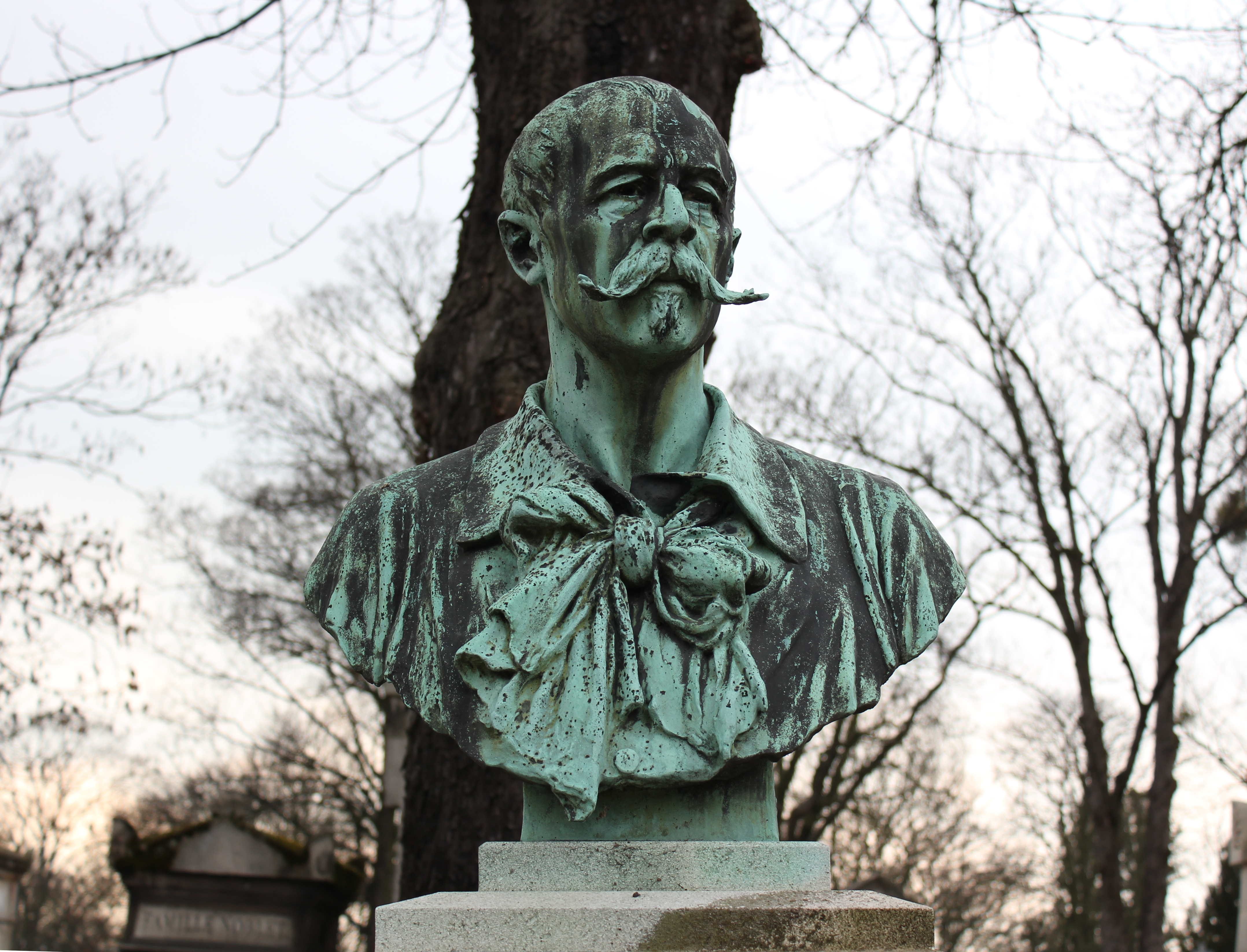 Sépulture d'Auguste Vitu (1823-1891), écrivain et journaliste ; son épouse et deux de ses filles. Tombe ornée d'un buste d'Auguste Vitu par Guilbert. Buste